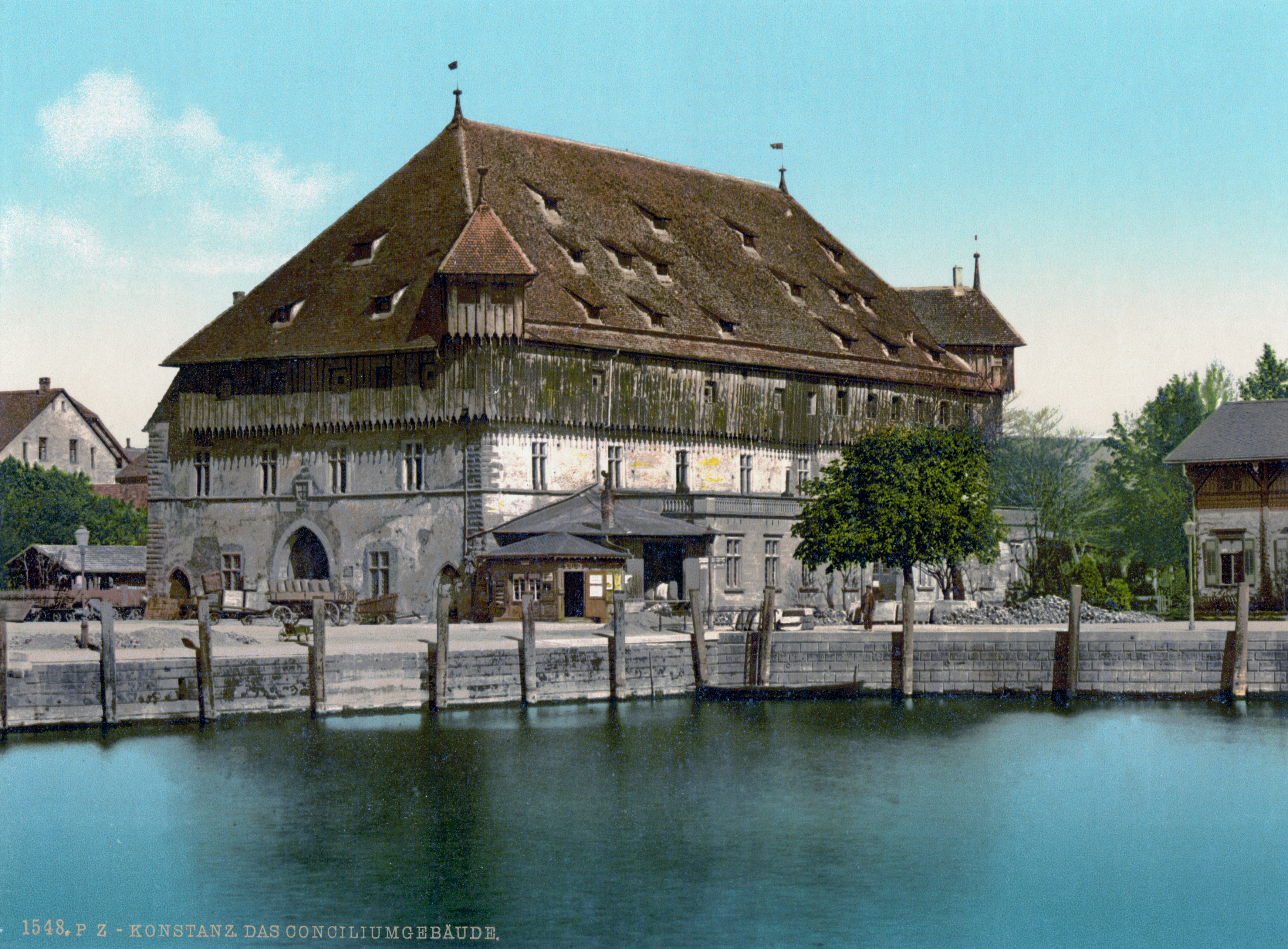 Konzilsgebäude Konstanz